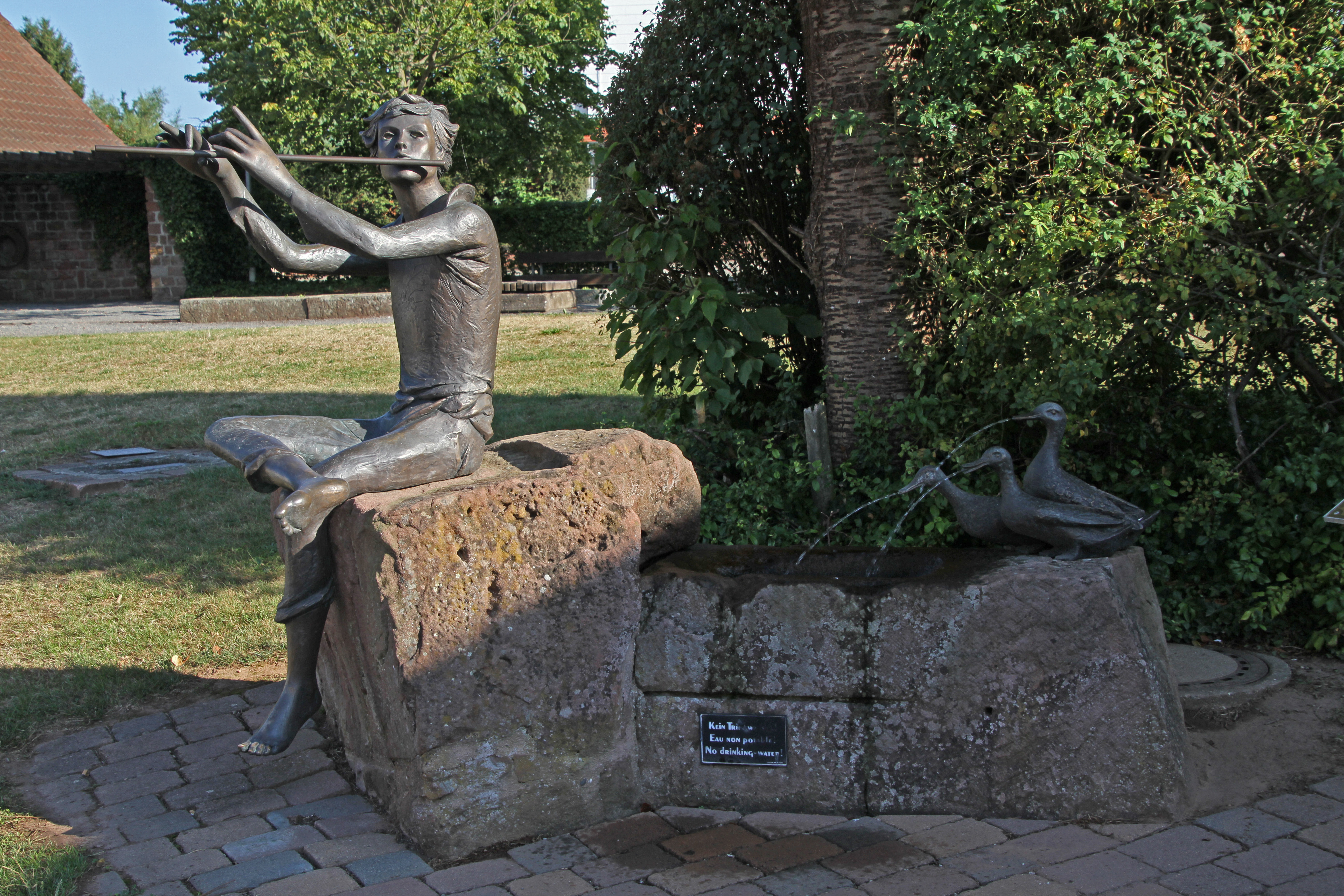 Donsieders, Flötenspieler.